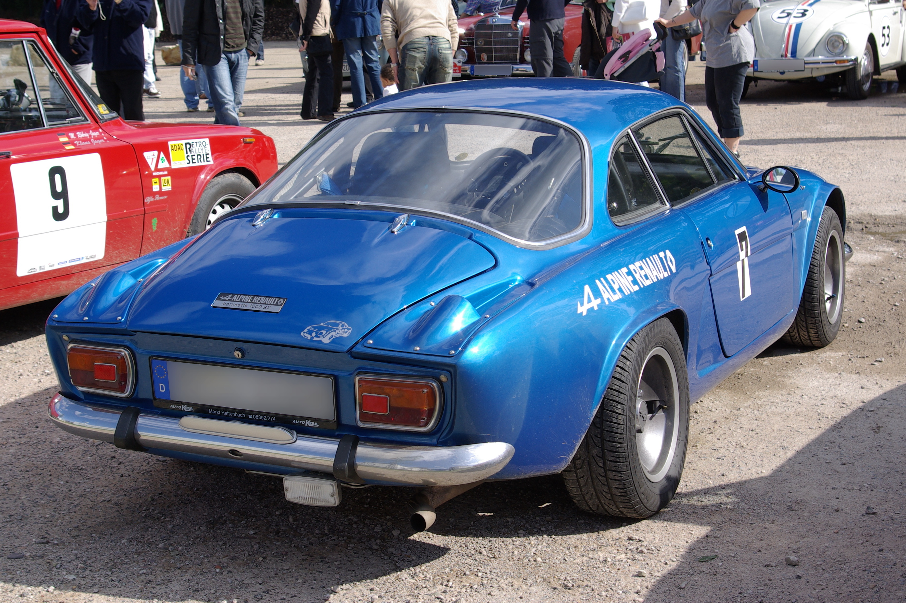 Alpine Renault berlinette 1600 SX A110 Baujahr 1977